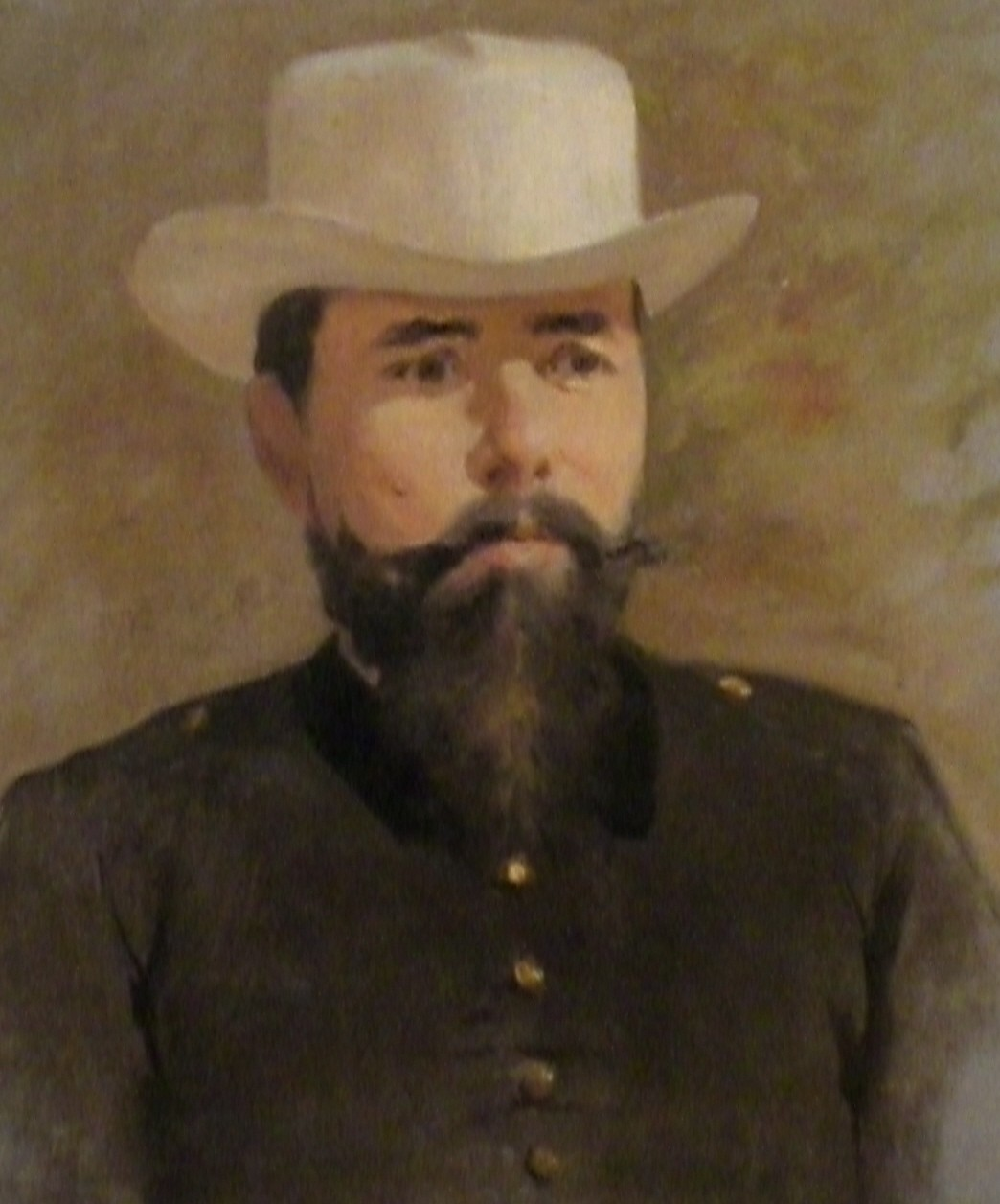 Boceto para un retrato del General Joaquín Crespo